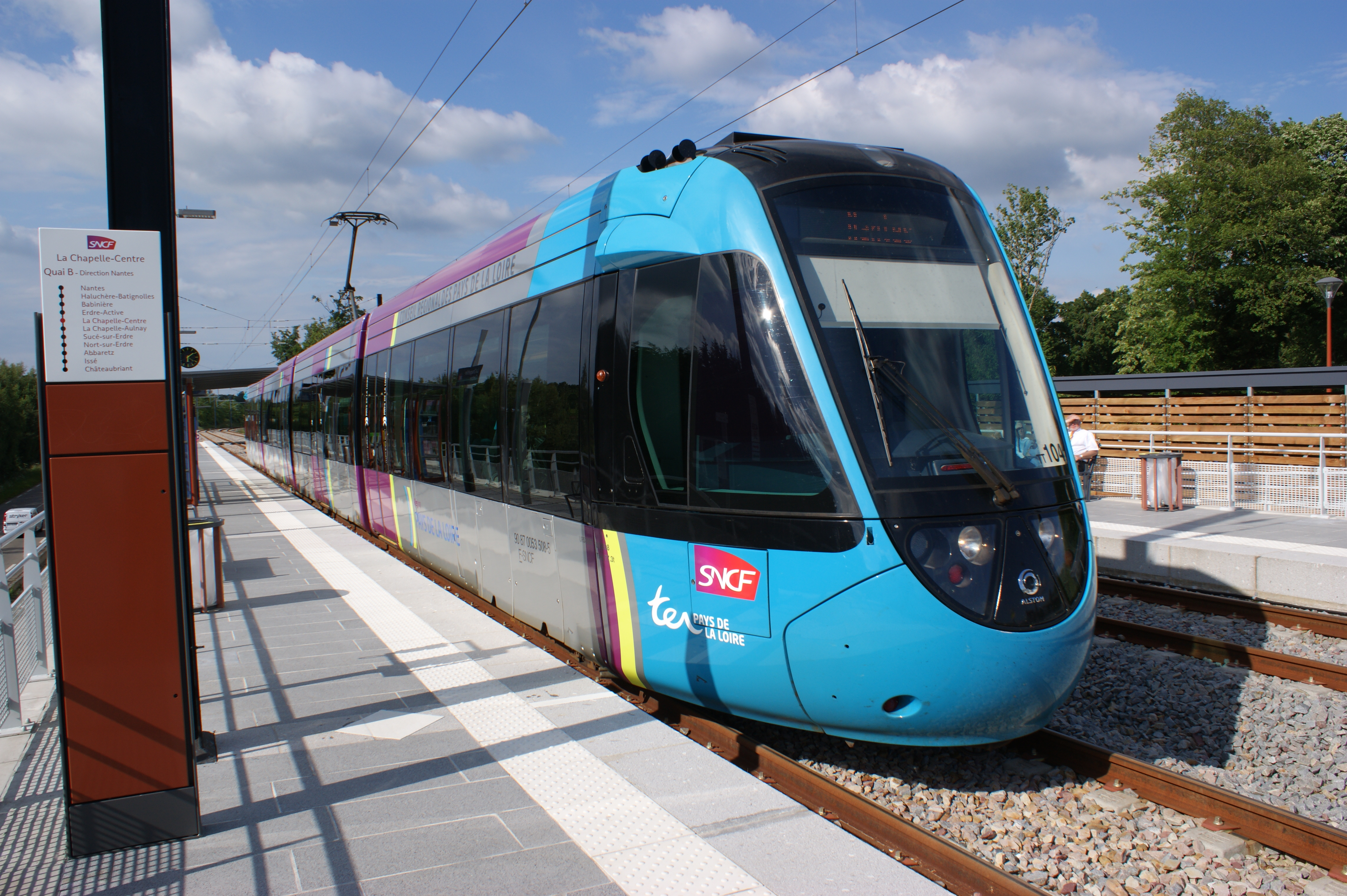 La nouvelle gare de La Chapelle-Centre desservie par le Tram-train n°104.